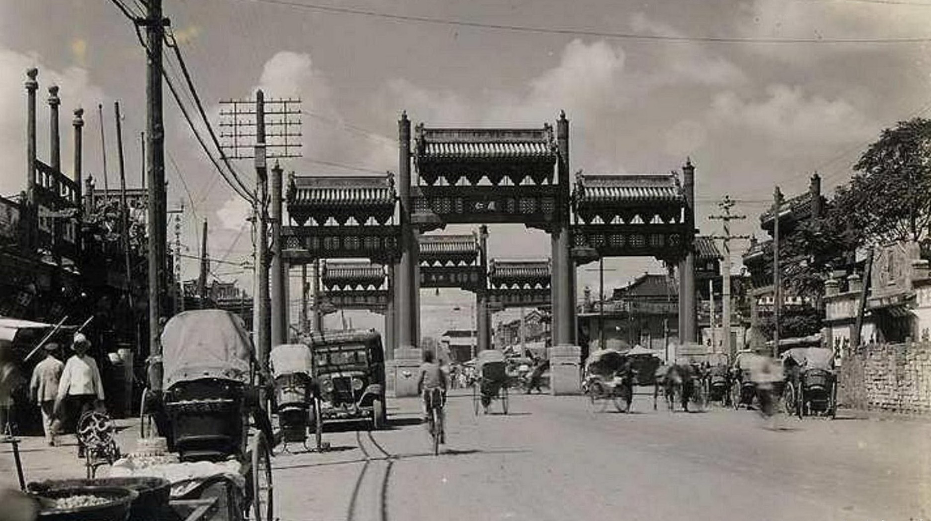 北京东四牌楼。1954年，为拓宽道路，四座牌楼均被拆除。